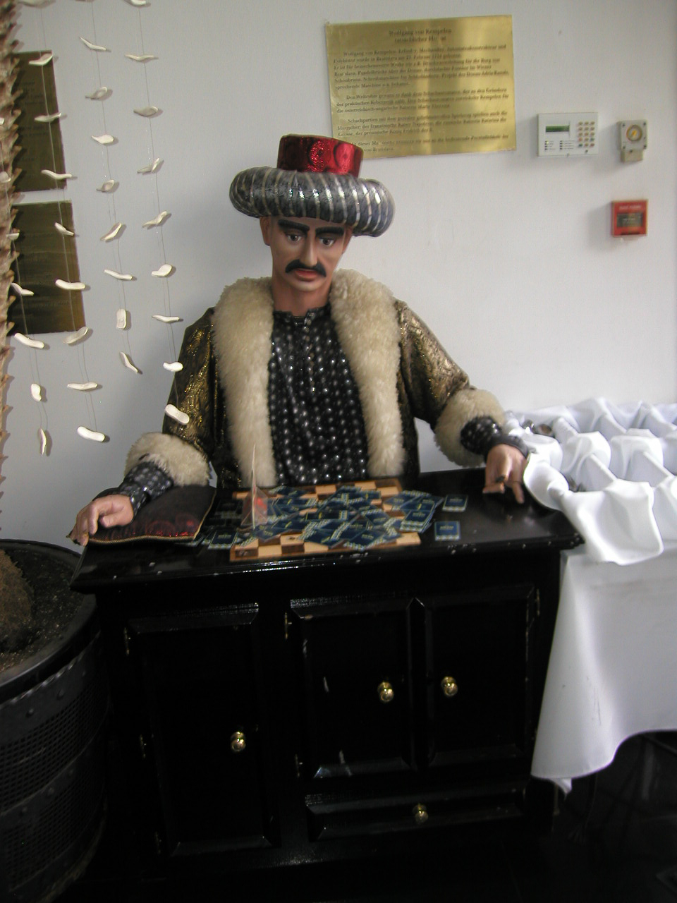 Nachbau des Schachtürken von Wolfgang von Kempelen im Café Roland in Bratislava